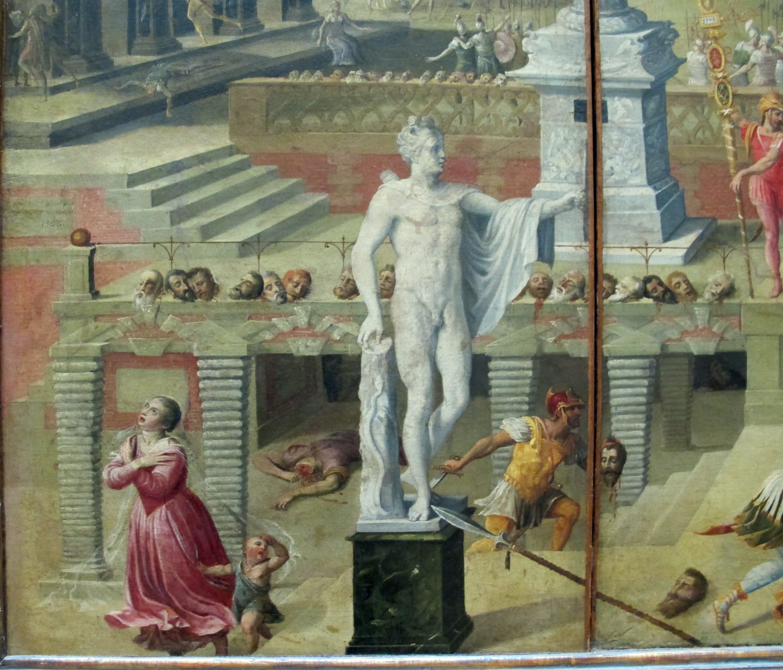 Pittura francese del XVI secolo, Louvre, Parigi